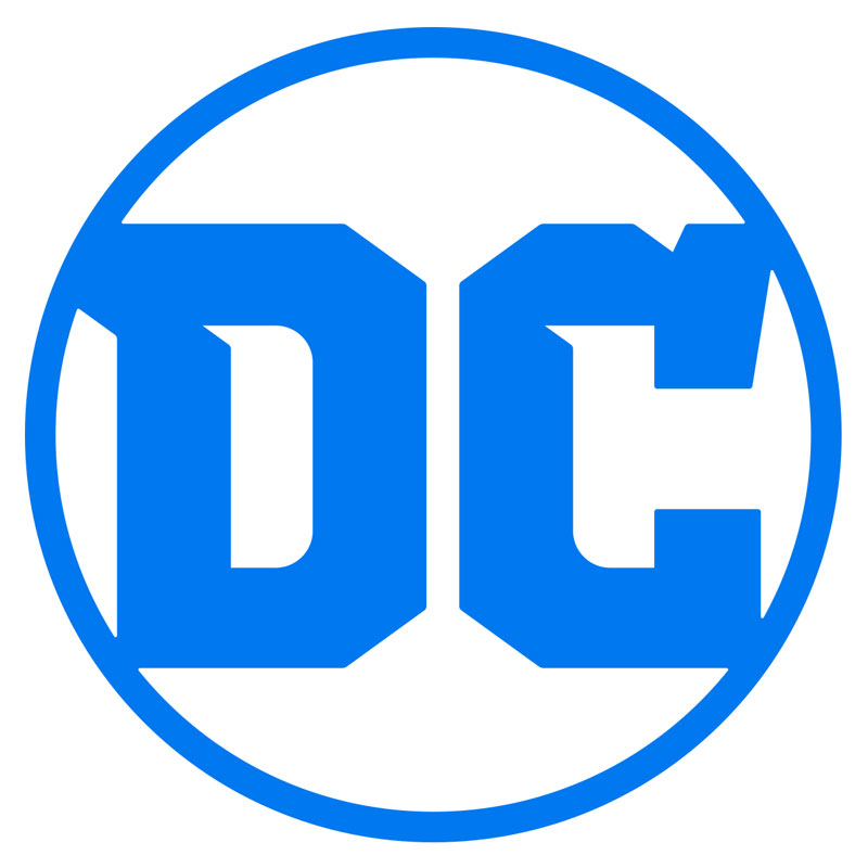 Logo von DC Comics